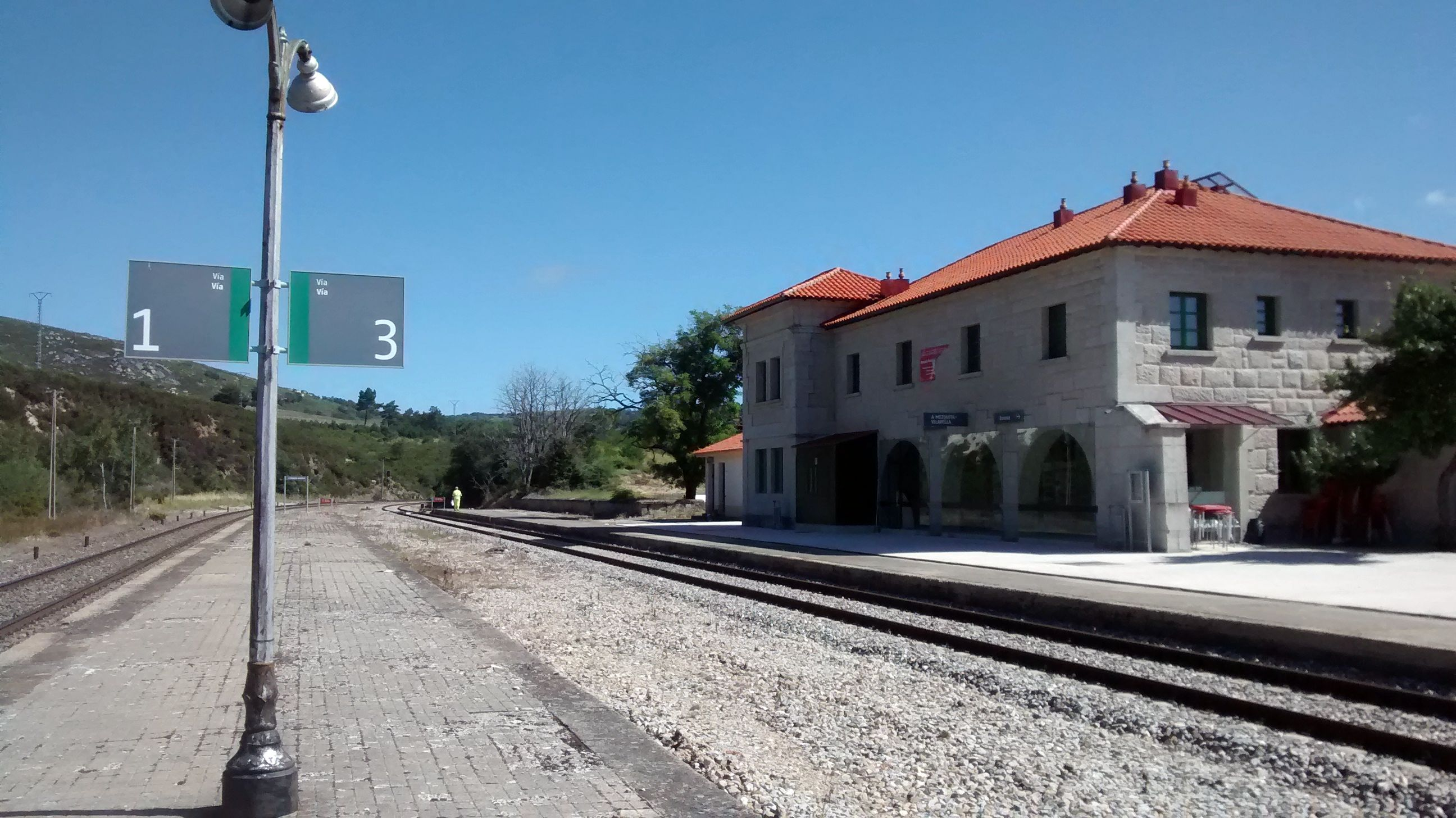 Estación de La Mezquita-Villavieja: Vista de los andenes de la estación.